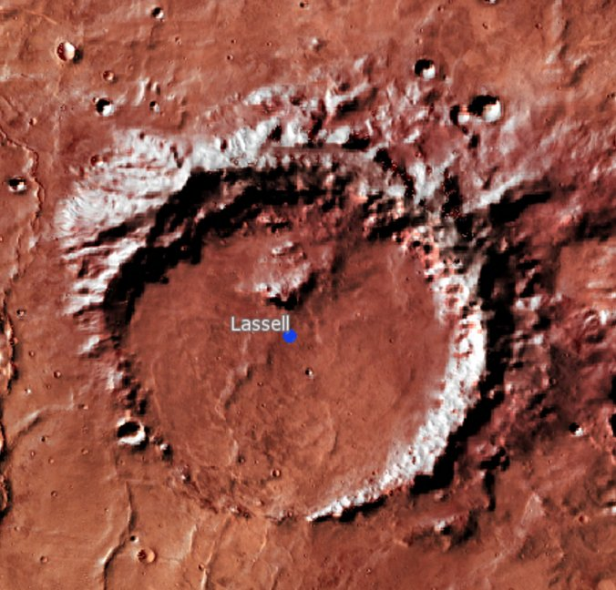 Cráter marciano Lassall. (Imagen IAU/USGS/Goddard/A SU/USGS)